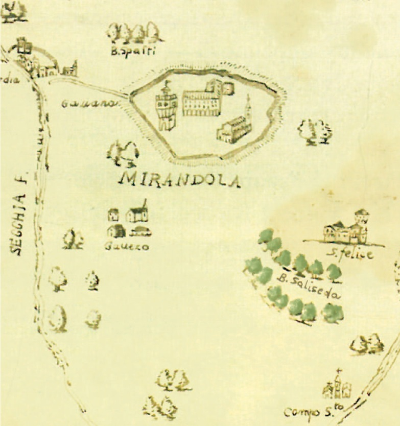 Mappa del territorio mirandolese e del bosco della Saliceta (particolare) Disegno anonimo a penna su carta, con tracce di acquerello. Epoca imprecisata (1620 ?).